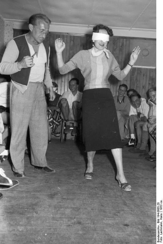 Work Camp auf Burg Liebenzell